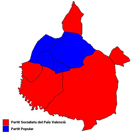 Partits polítics més votats als municipis de la Plana d'Utiel (País Valencià) després de les eleccions municipals de 2007.